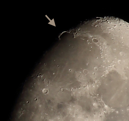 Goldener Henkel, Hinweispfeil, 06 Feb. 2017, 22:27 MEZ